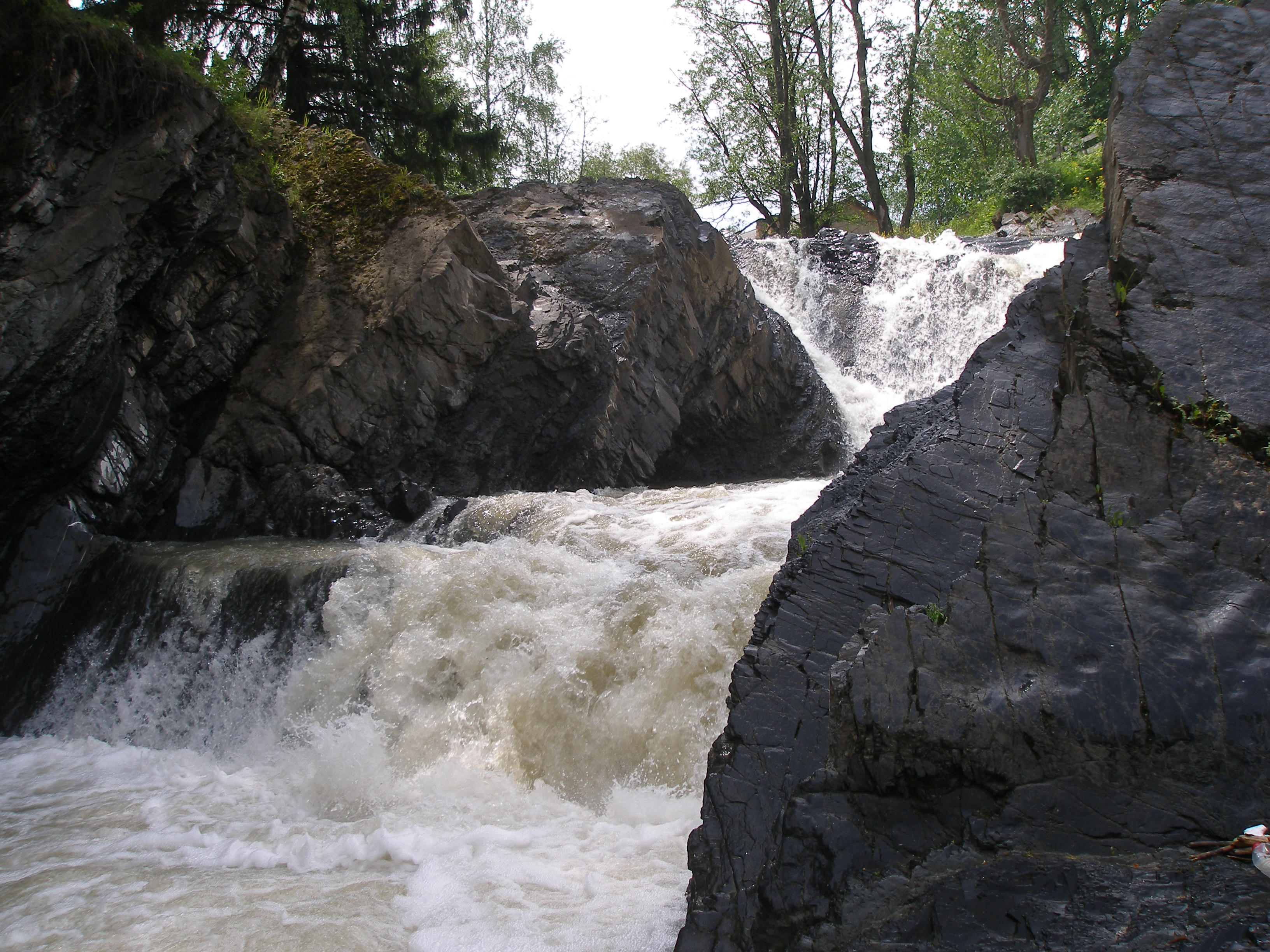 Водоспад «Гук Сучавський», Путильський район с. Шепіт Горішний